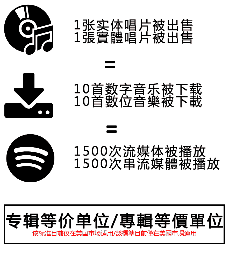 美国所采用的专辑等级单位换算示意图（简体中文版）